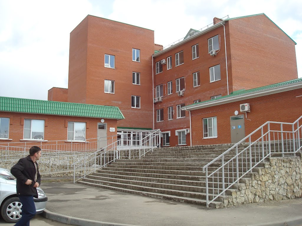 Поликлиника, поселок Яблоновский, Республика Адыгея.